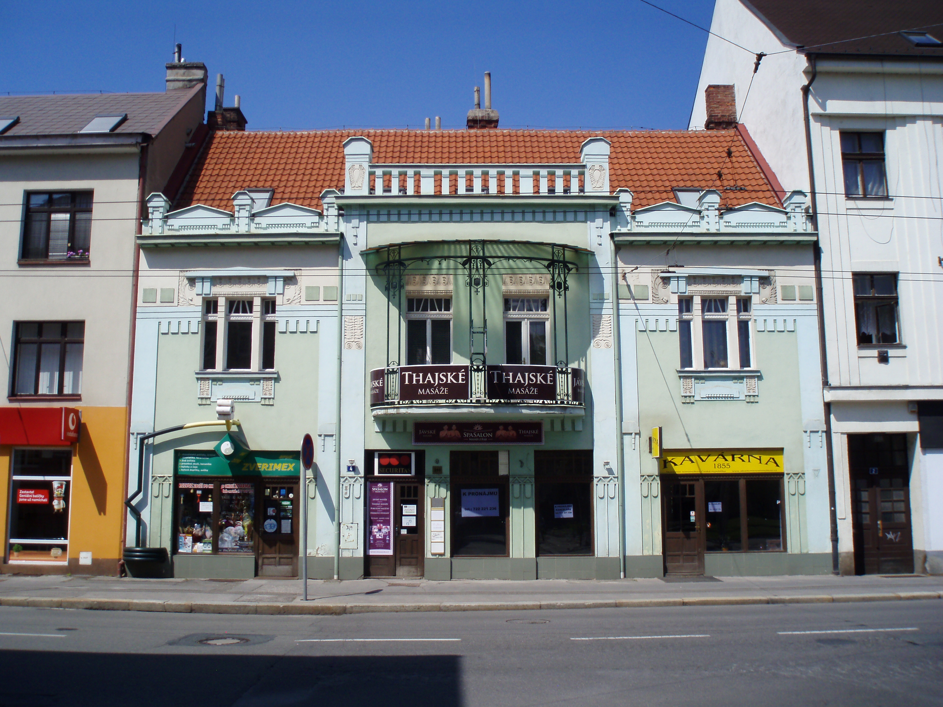 S. K. Neumanna čp. 250